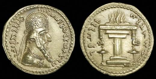 Der Begründer des Sassanidenreichs Ardaschir I. (-240 n. Chr.) auf einer Goldmünze